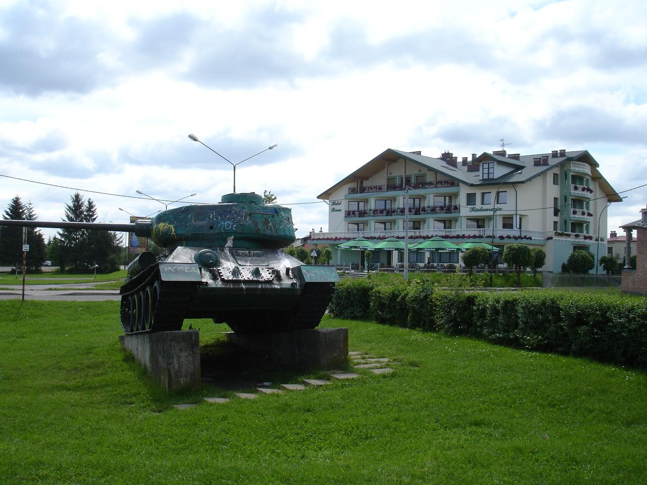 czołg w sanoku stoi w miejscu dawnej granicy sowiecko - niemieckiej z roku 1939